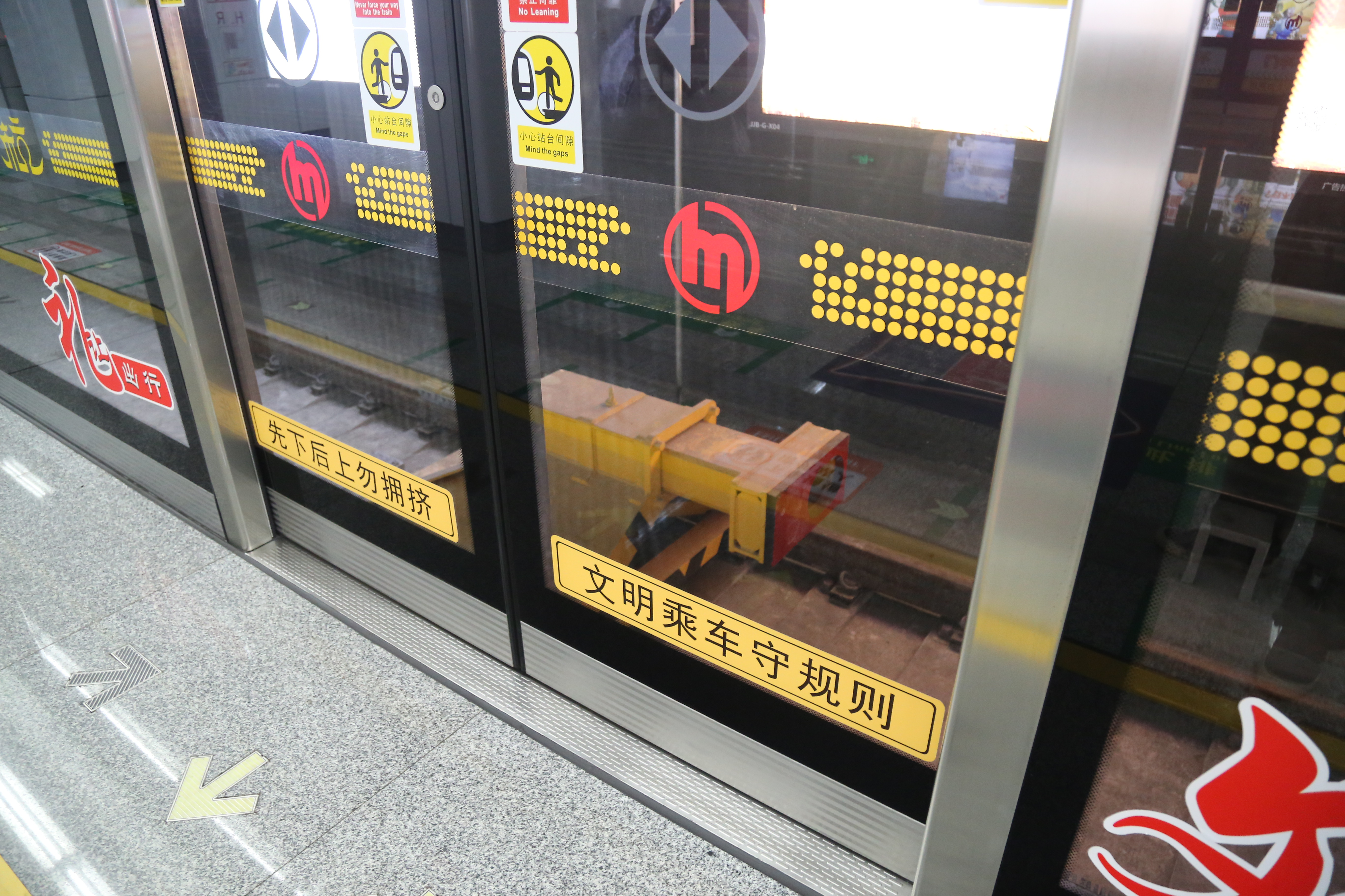 4号线下行站台内的车挡，该车挡的存在使得下行站台不能停车